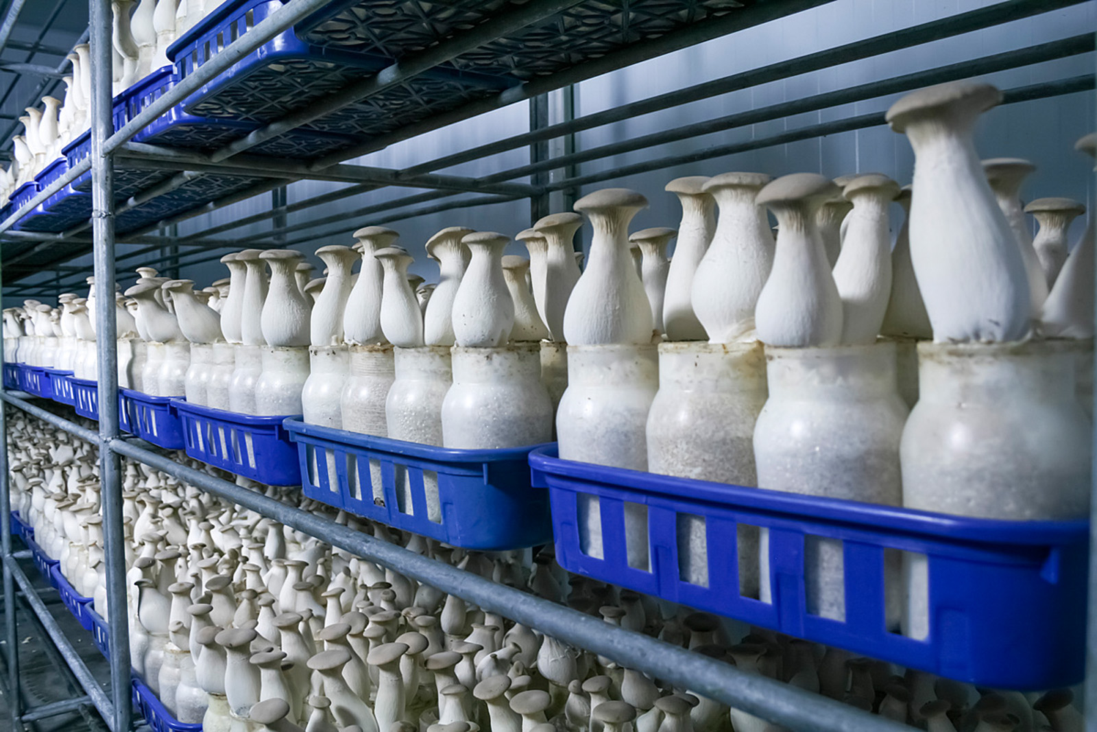 Cultivo de seta de cardo (Pleurotus eryngii) en Pradejón (La Rioja), localidad líder en el cultivo de champiñón y setas en España.